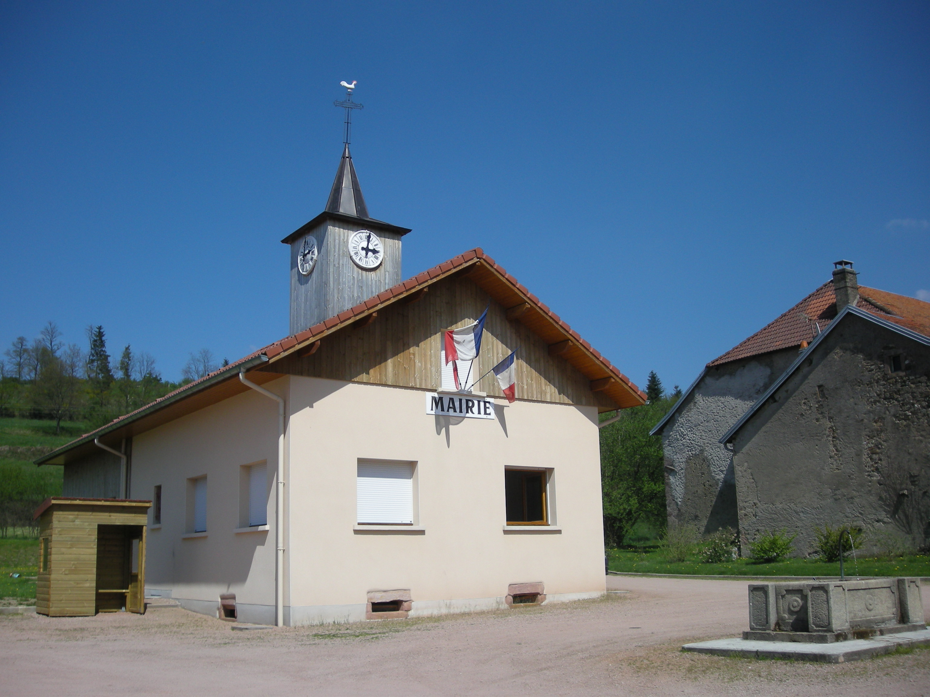 La mairie-église de Lesseux (Vosges)